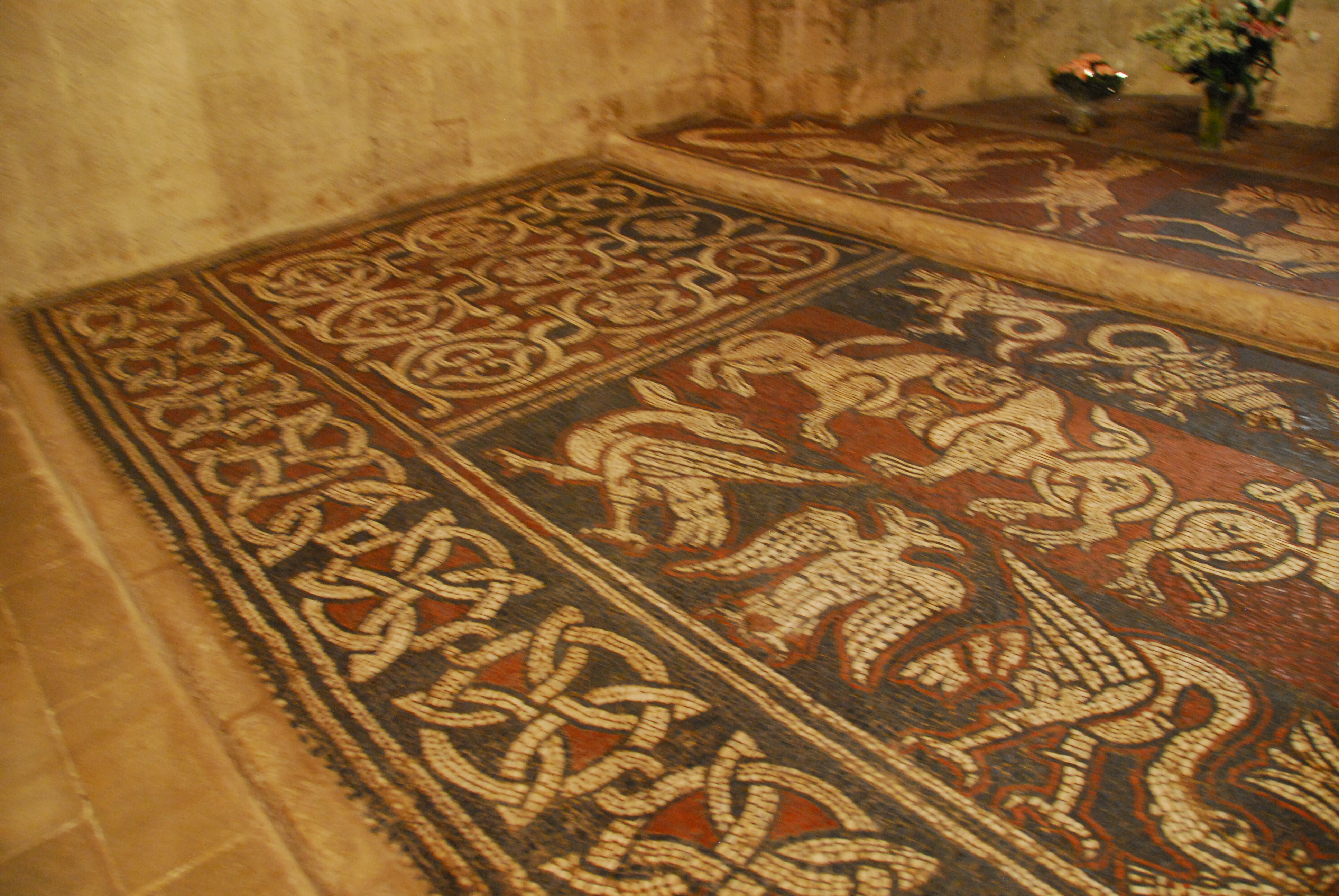 Prieuré de Ganagobie, Mosaik Nr. 3, Stufe